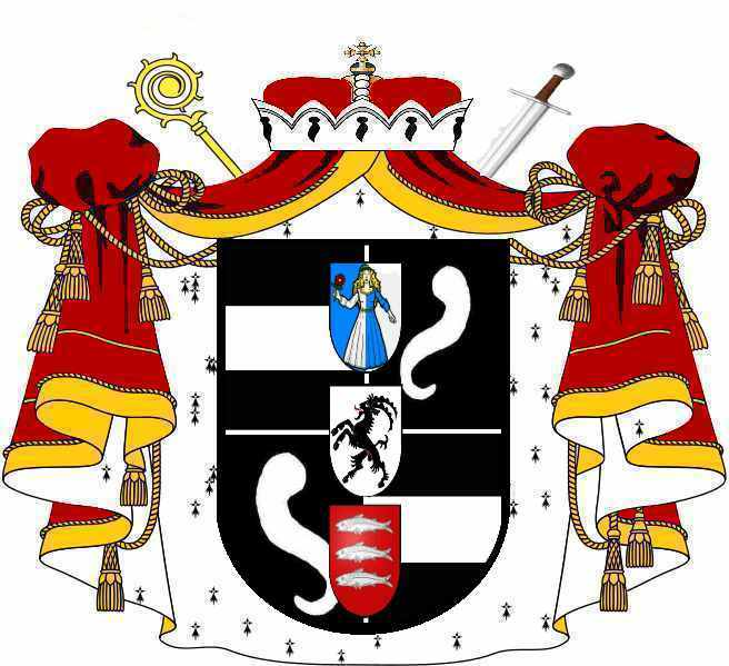 Wappen Karl Rudolf von Buol-Schauenstein, Fürstbischof von Chur 1794-1823, Bischof von Chur-St. Gallen 1823-1833